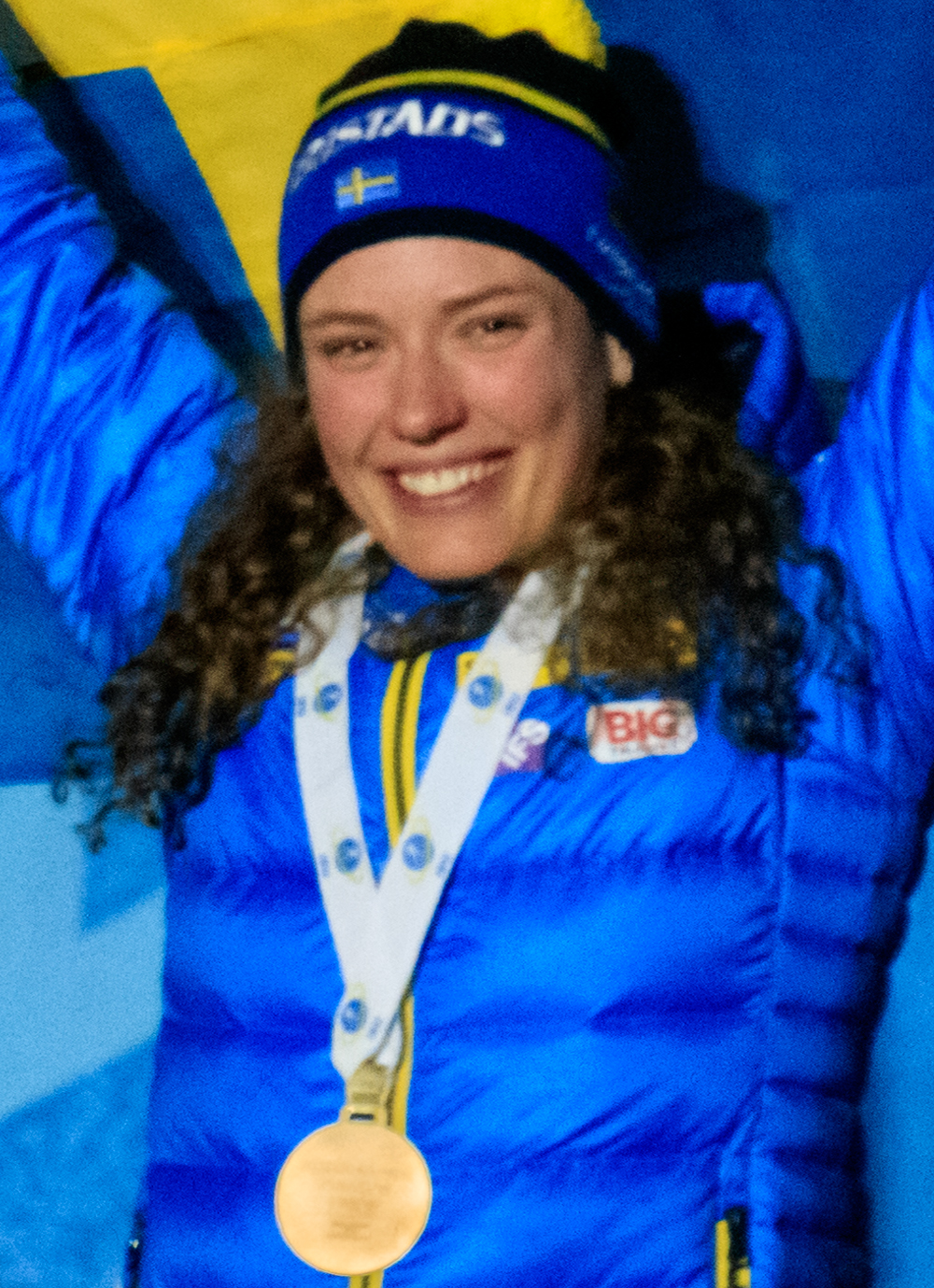 Hanna Öberg med Guldmedaljen efter 15km distans vid VM i Östersund 2019